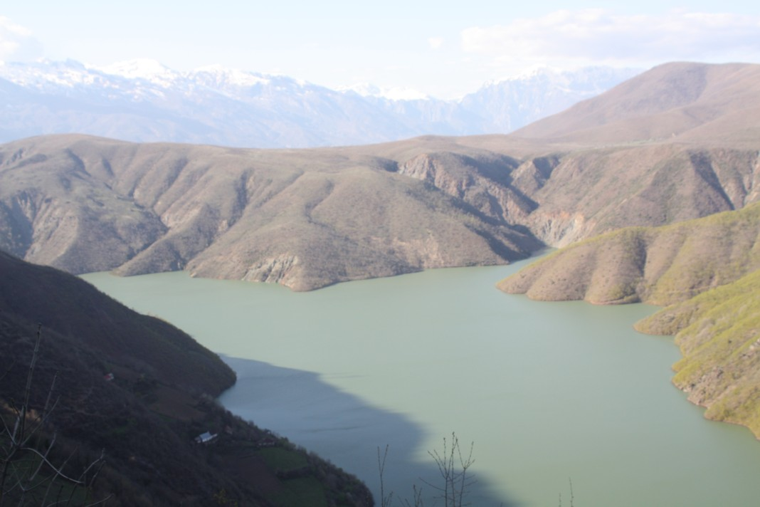 Lake Fierza, Northern Albania